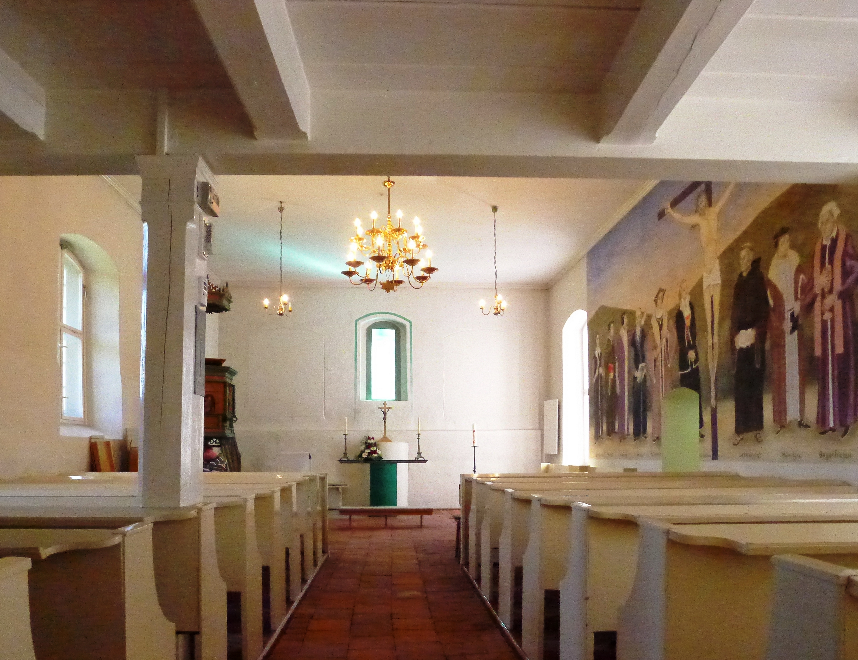 Blick in den Kirchraum in Richtung Altar der Dorfkirche Alt-Staaken